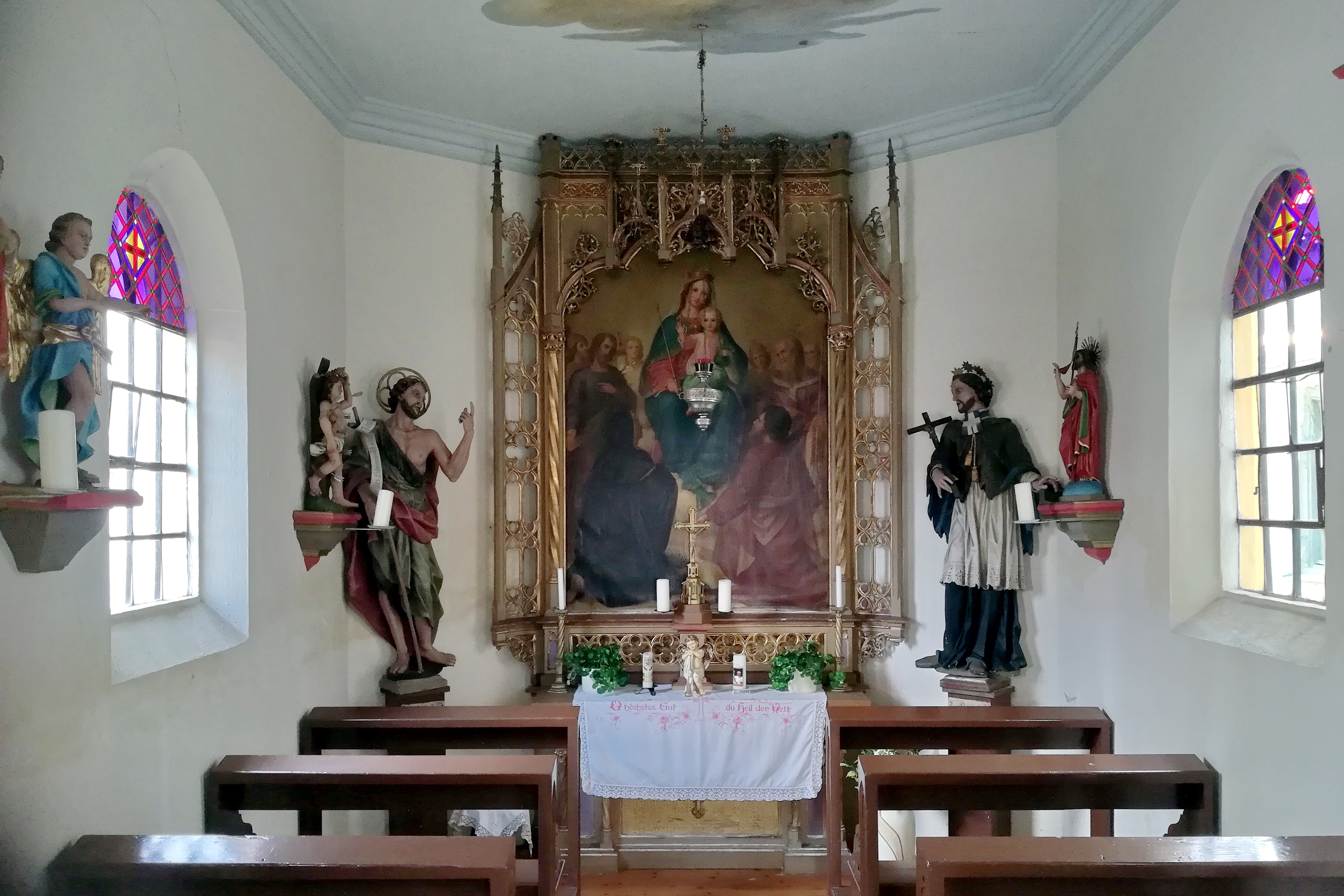 Ortskapelleː verputzter Satteldachbau mit Giebelreiter und getreppter Blende am Giebel, neugotisch, bezeichnet 1867; mit Ausstattung